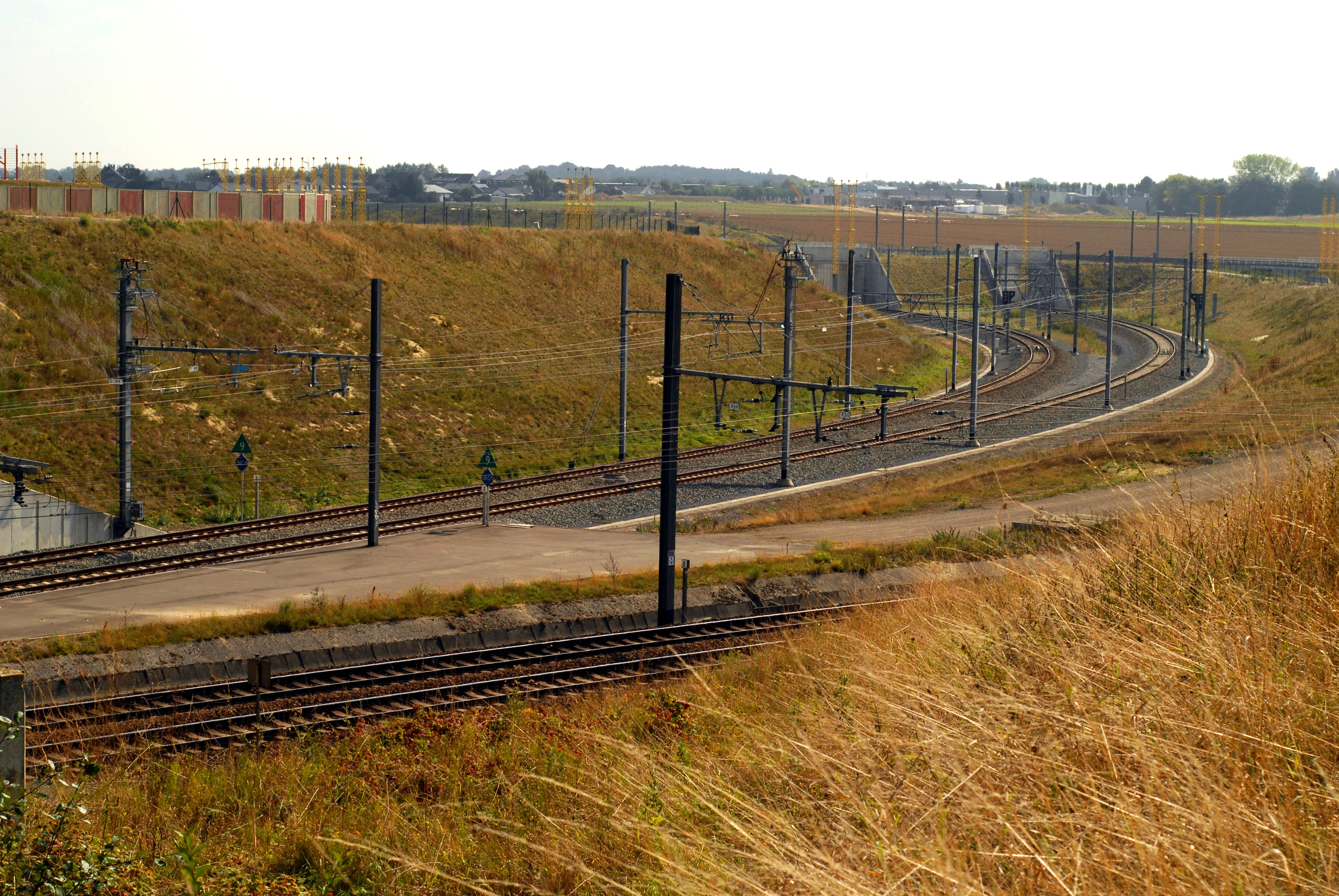 Bocht van Nossegem, aansluiting tussen spoorlijn 36 komende van Leuven naar het station Brussel-Nationaal-Luchthaven.